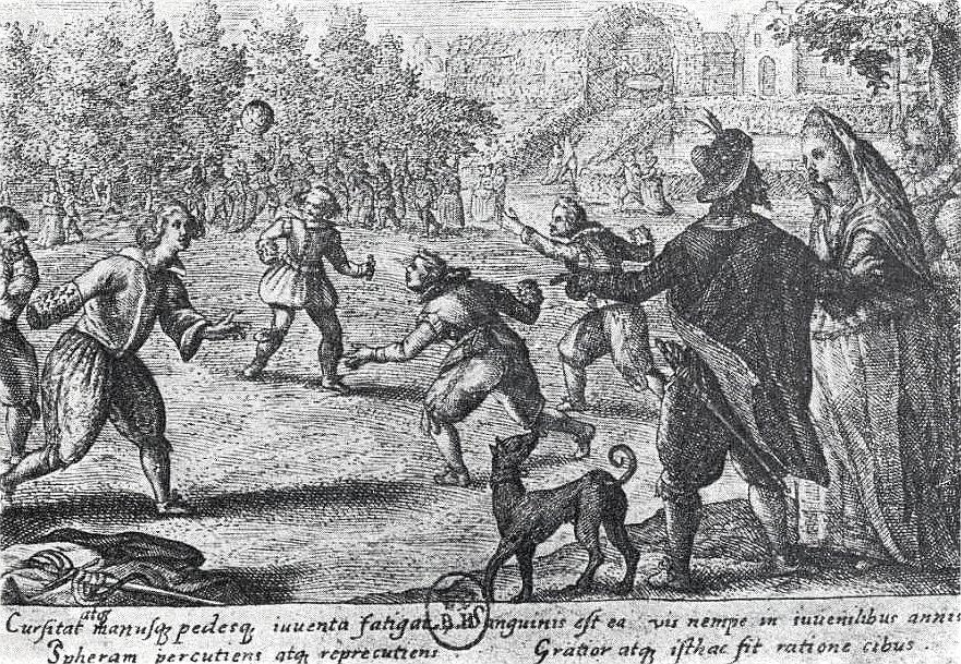 Jeu de balle en plein air au XVIe siècle en France.